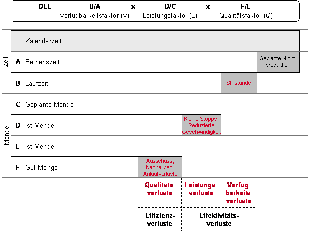 Definition der Zeiten zur OEE-Bestimmung